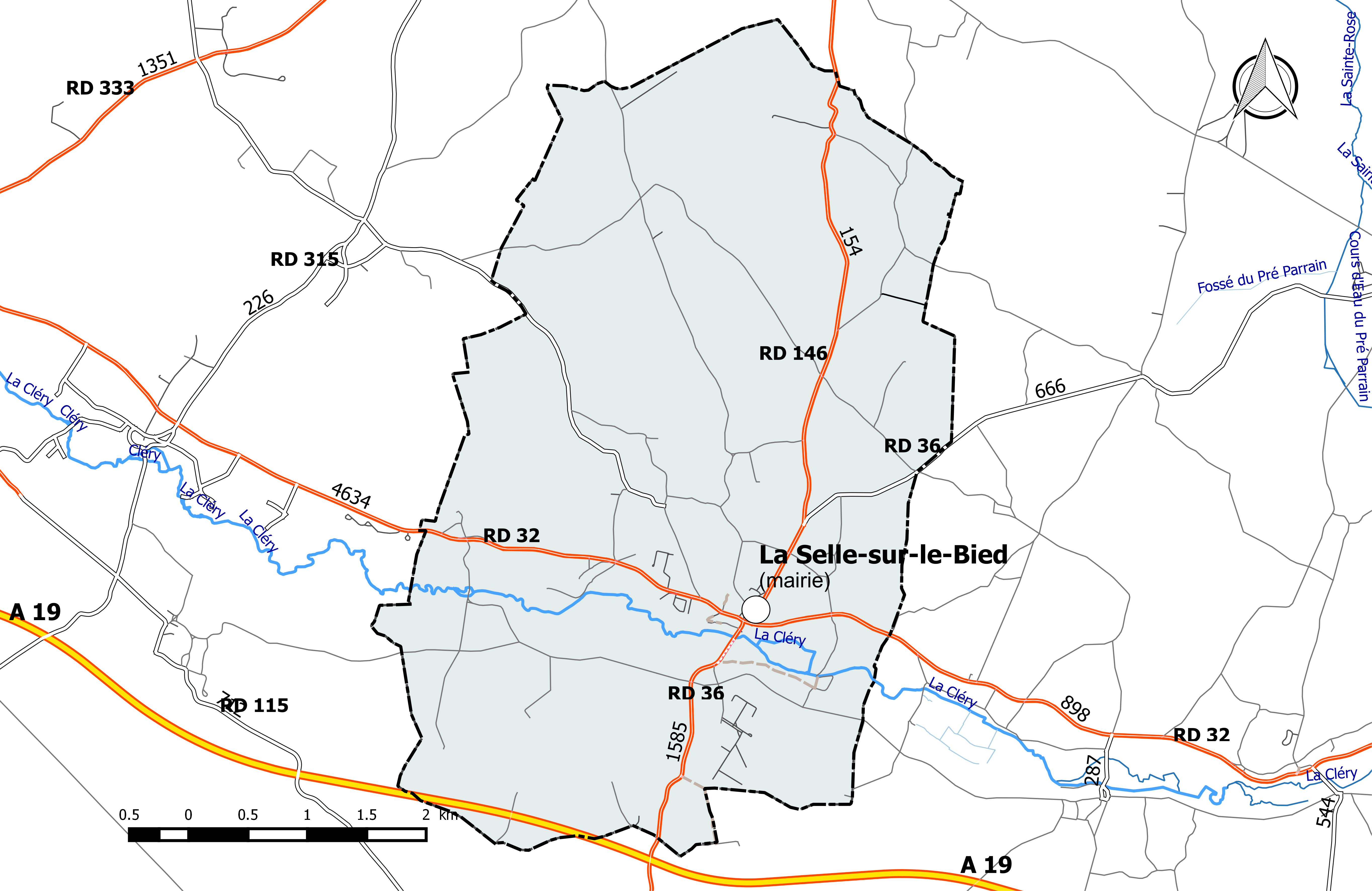 Carte du réseau routier de la commune de La Selle-sur-le-Bied.